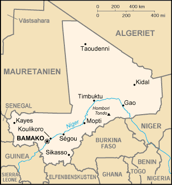 Carte du Mali CIA map of Mali (in French) Source : CIA World Factbook (traduite/translation) Historique de la carte originale Image:Mali_sm03.jpg (suppr) (actu) 15 septembre 2004 à 12:32 . . BernardM . . 350x376 (27969 octets) (carte du Mali francisée) (suppr) (rétab) 22 novembre 2003 à 21:45 . . Rinaldum . . 350x376 (27182 octets) (copié de wiki en;) Fichier GIMP disponible : Image:Mali_sm03.xcf (version de BernardM)